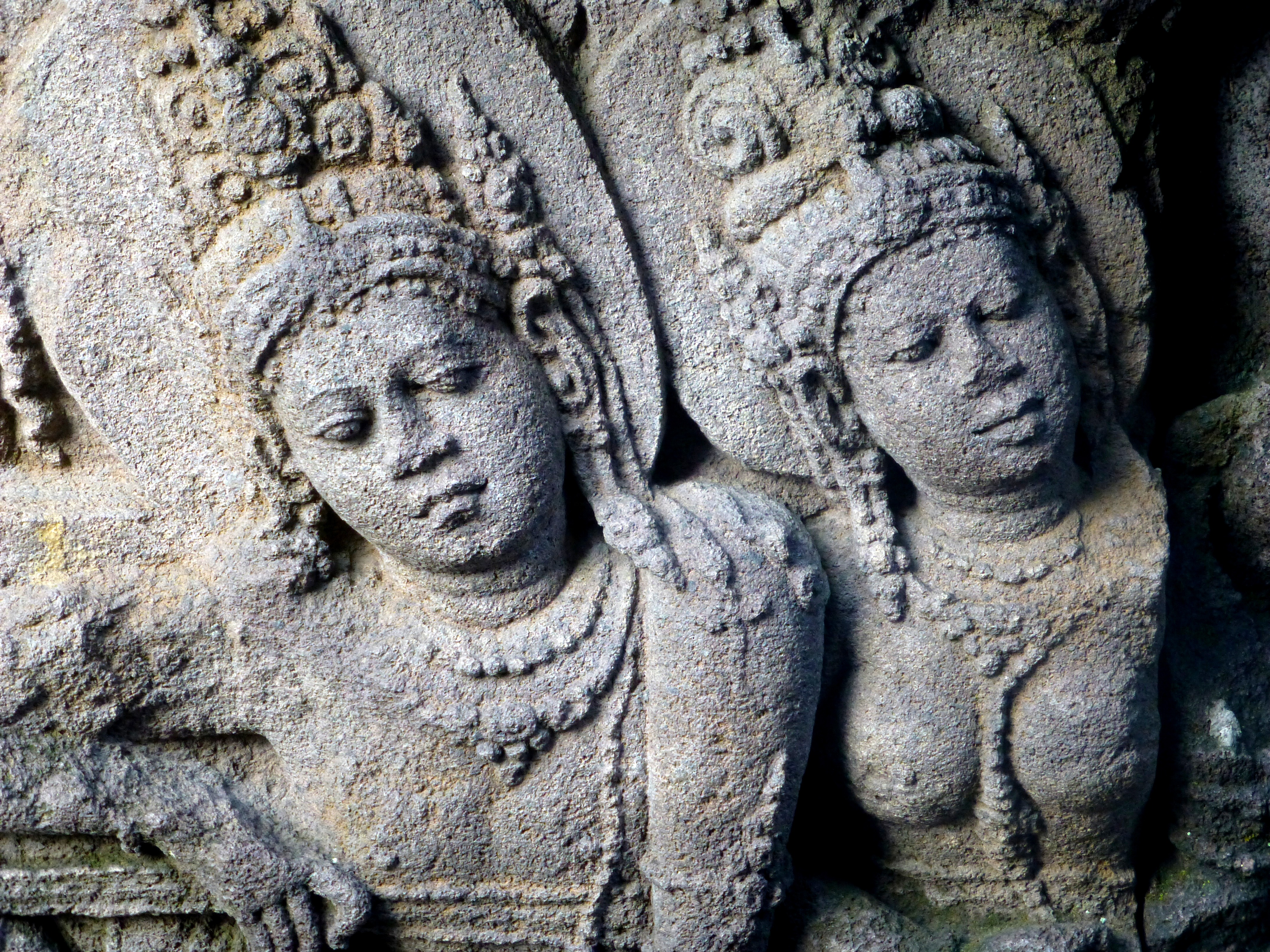 067 Rama and Sita, Brahma Temple, Prambanan, Central Java Photograph from Prambanan temple compound near Yogyakarta in Java, Indonesia taken by Anandajoti.